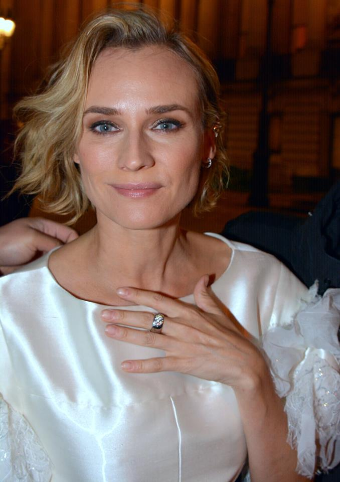 Diane Kruger au dîner des révélations des César du cinéma